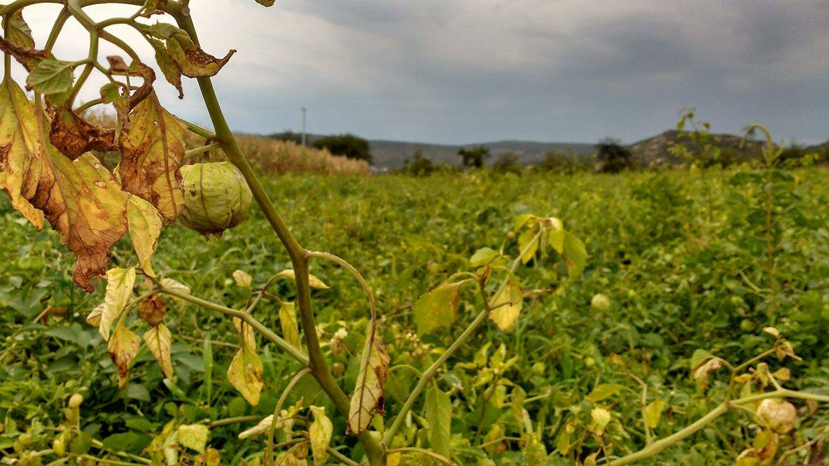 Campos de producción de hortalizas